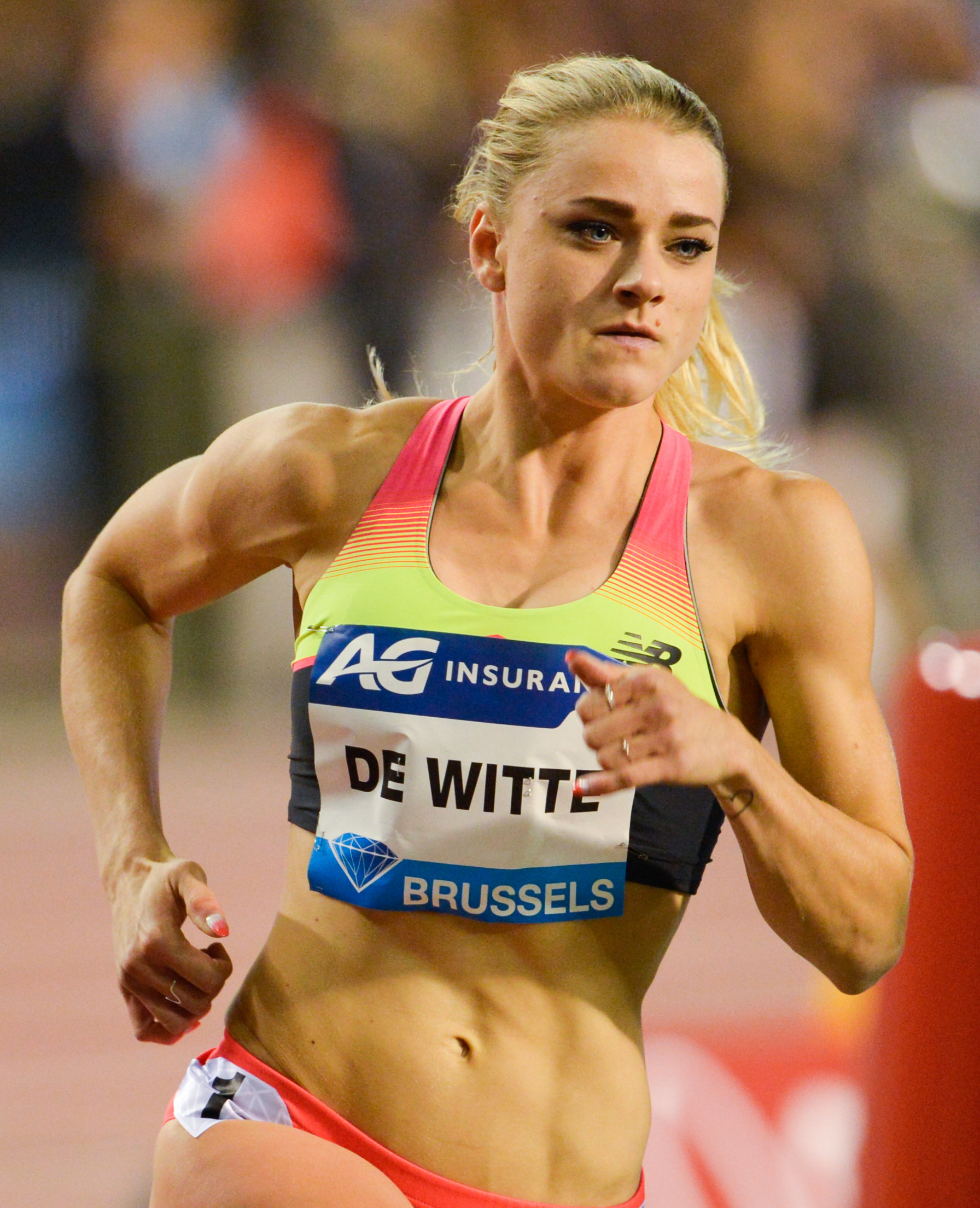 Lisanne de Witte in actie op de 400 m tijdens de Memorial Van Damme 2015, Brussel